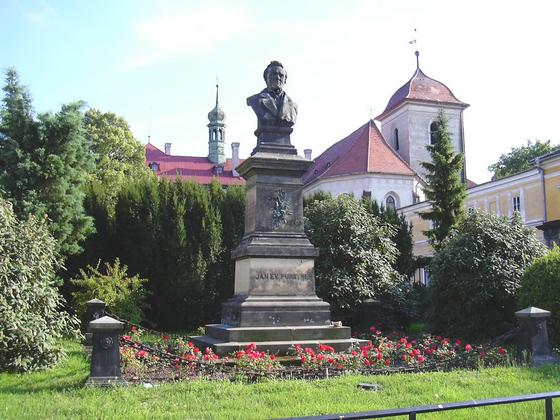 Socha Jana Evangelisty Purkyně v Libochovicích. Autorem pomníku je Josef Strachovský (1850-1913).